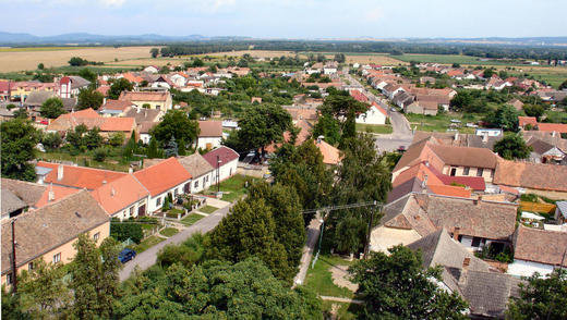 Hrabětice, 2006, pohled z kostela sv. Antonína Paduánského